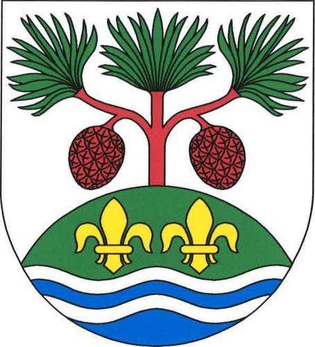 Ludvíkovice znak